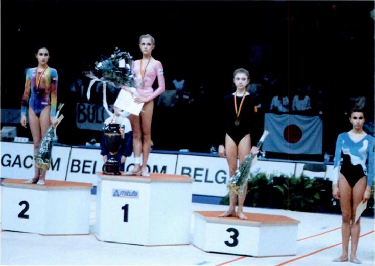 De izquierda a derecha: Maria Petrova, Oksana Kóstina, Larissa Loukianenko y Carmen Acedo, en el podio de la general del Campeonato Mundial de Gimnasia Rítmica de Bruselas en 1992.